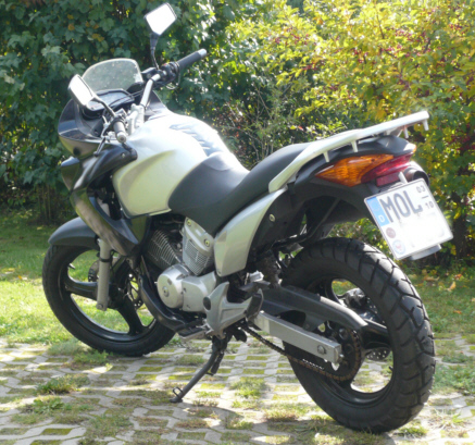 Honda Varadero XL 125 V (Baujahr 2001)